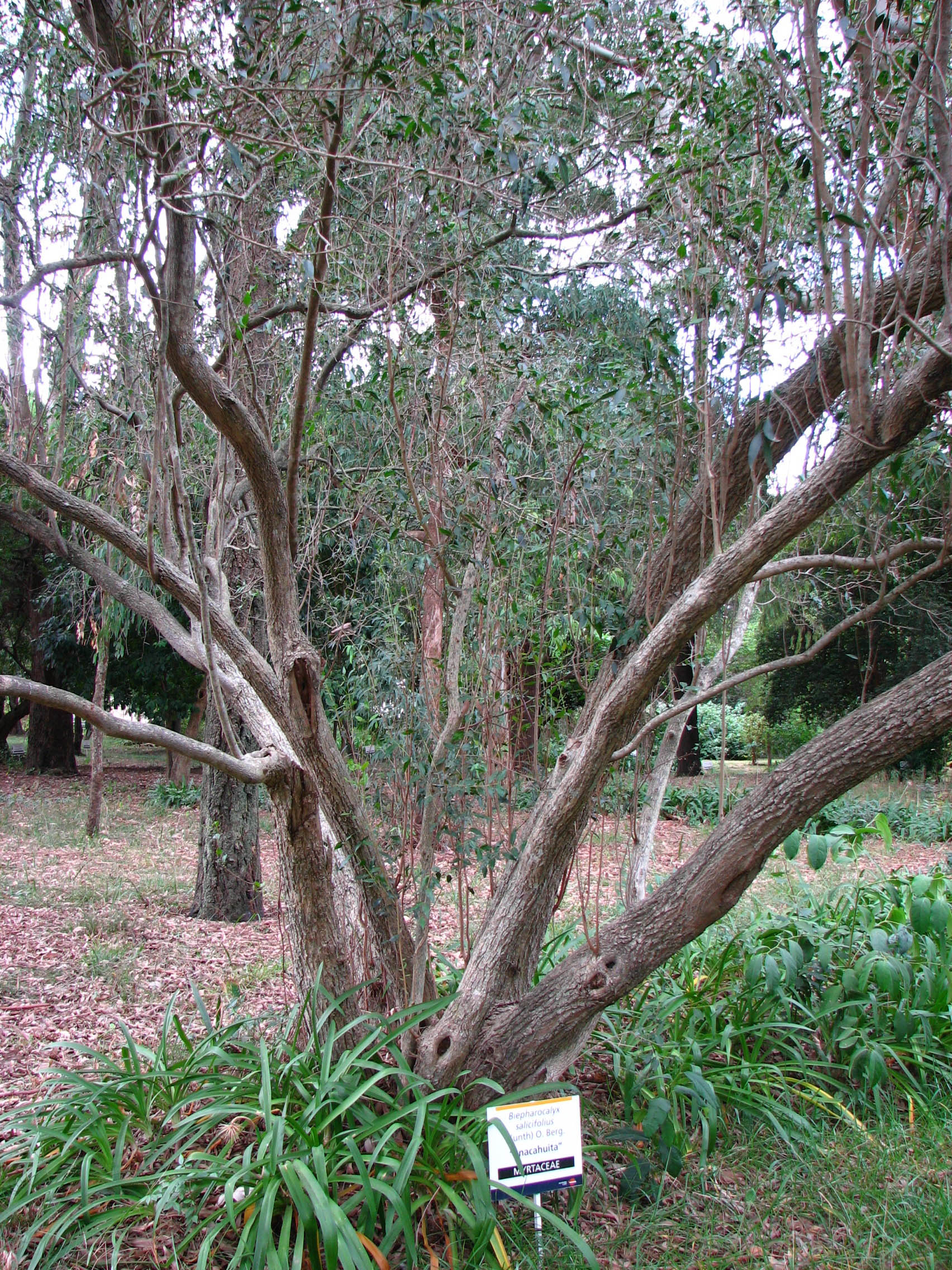 Ejemplar de Blepharocalyx salicifolius, en el Jardín Botánico "C. Spegazzini" de la ciudad de La Plata, Argentina.